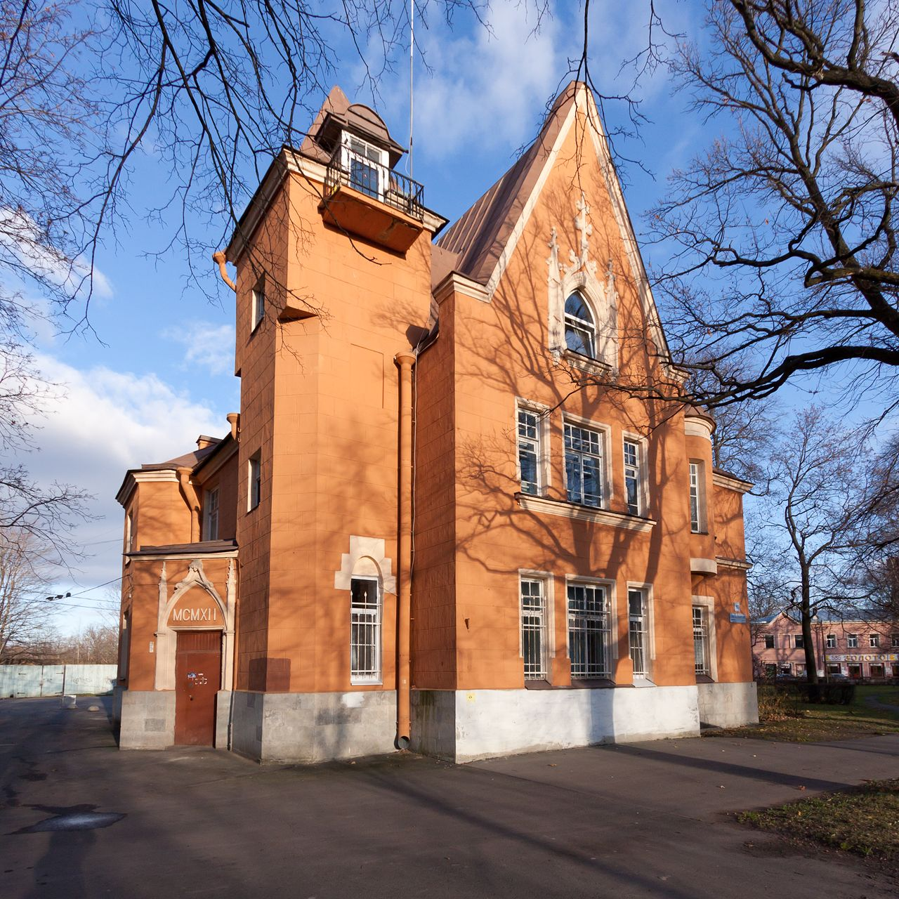 Дом редичкина (Санкт-Петербург и Лен.область, Петергоф, красный пр., 51)